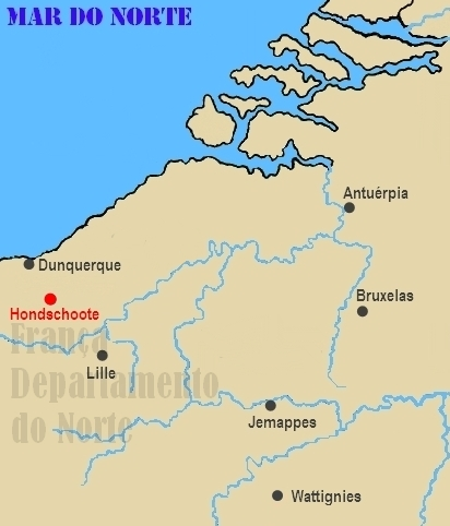 Mapa com a localização de Hondschoote